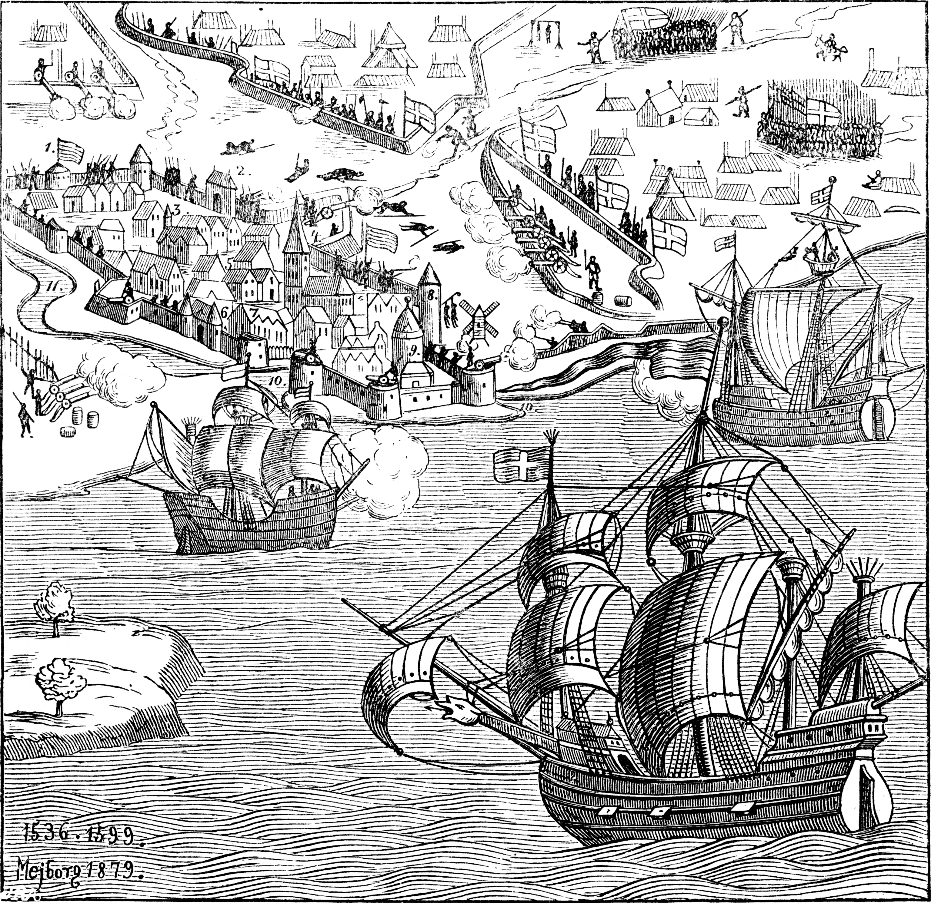 Copenhagen